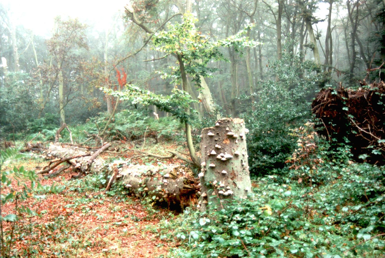 Ahrenshooper mit liegendem Totholz nach Windwurf. Eigene Fotografie im Oktober 1995.